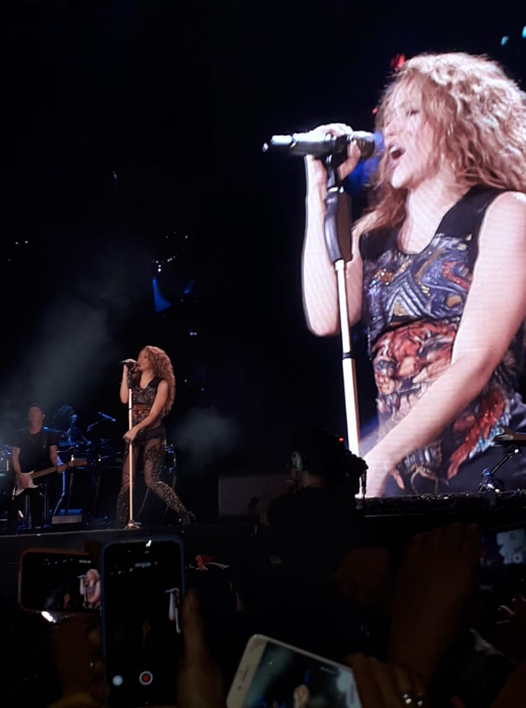 Shakira durante su gira: El dorado World Tour en Bogota Colombia